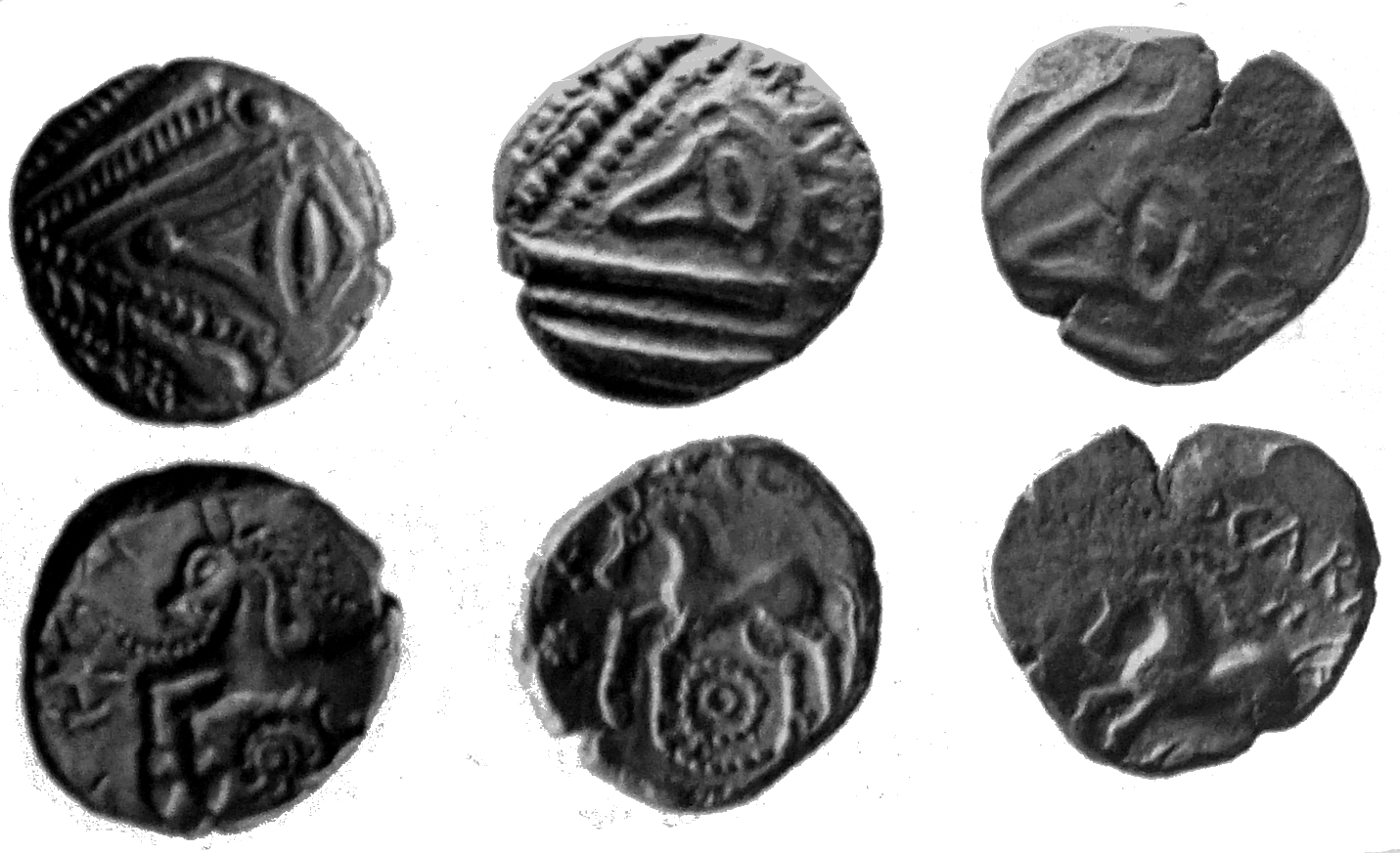 Statères à l'oeil (avers) et au cheval (revers)trouvé lors de fouilles archéologiques.